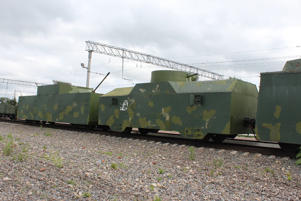 Памятник